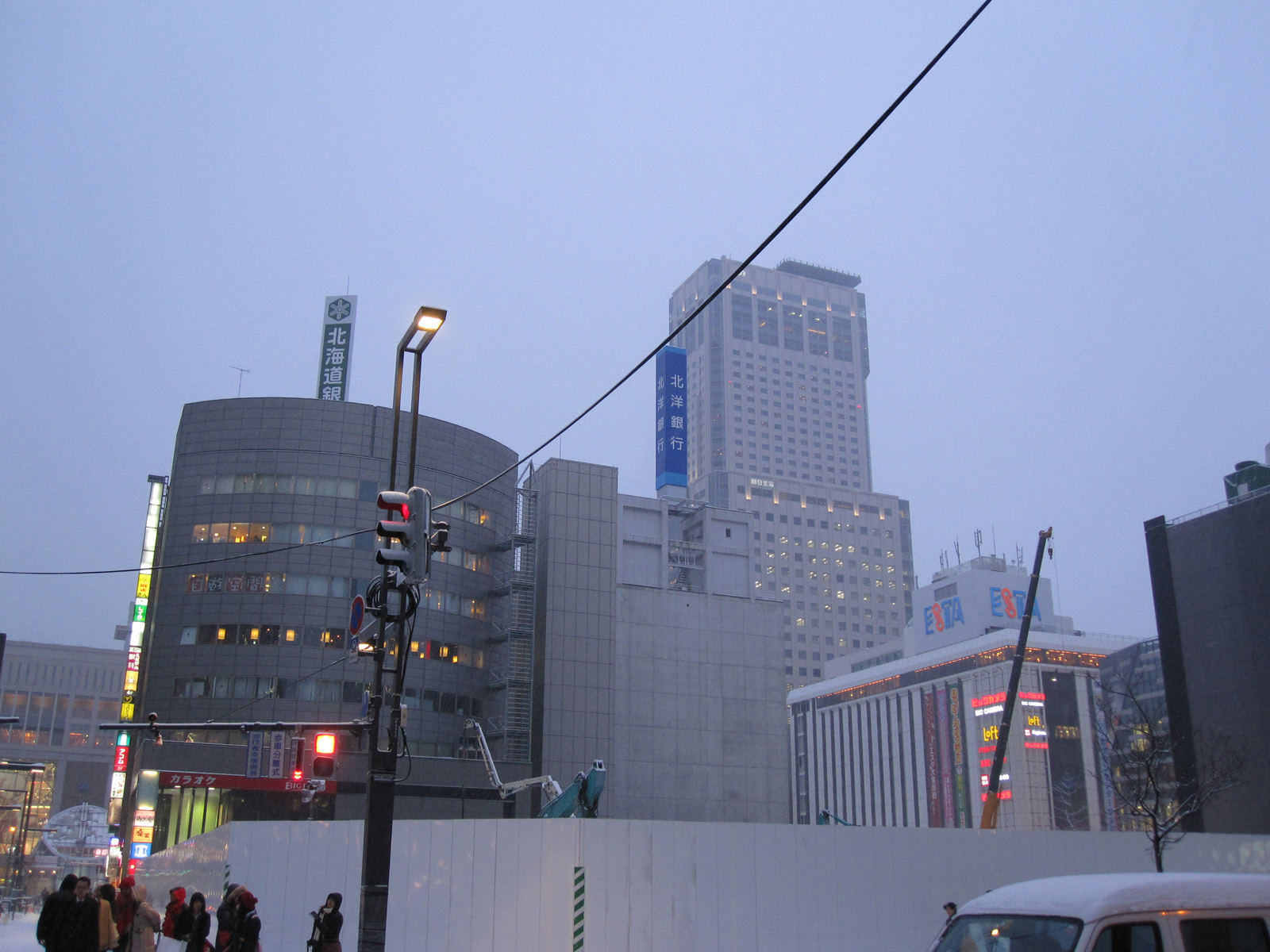 解体された札幌西武跡地、この場所からエスタ・JRタワーが見える機会は希少である。